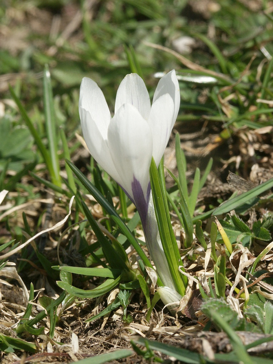 Crocus vernus subsp. albiflorus, Allgäuer Alpen, Germany